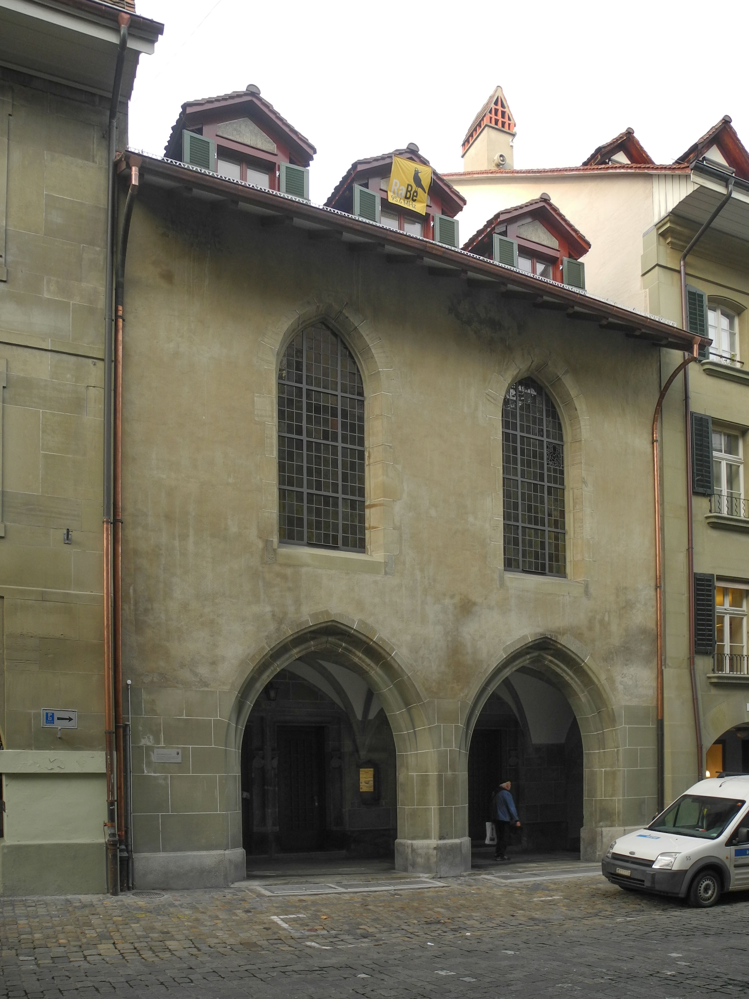 Ehemalige Antonierkirche, Fassade zur Postgasse